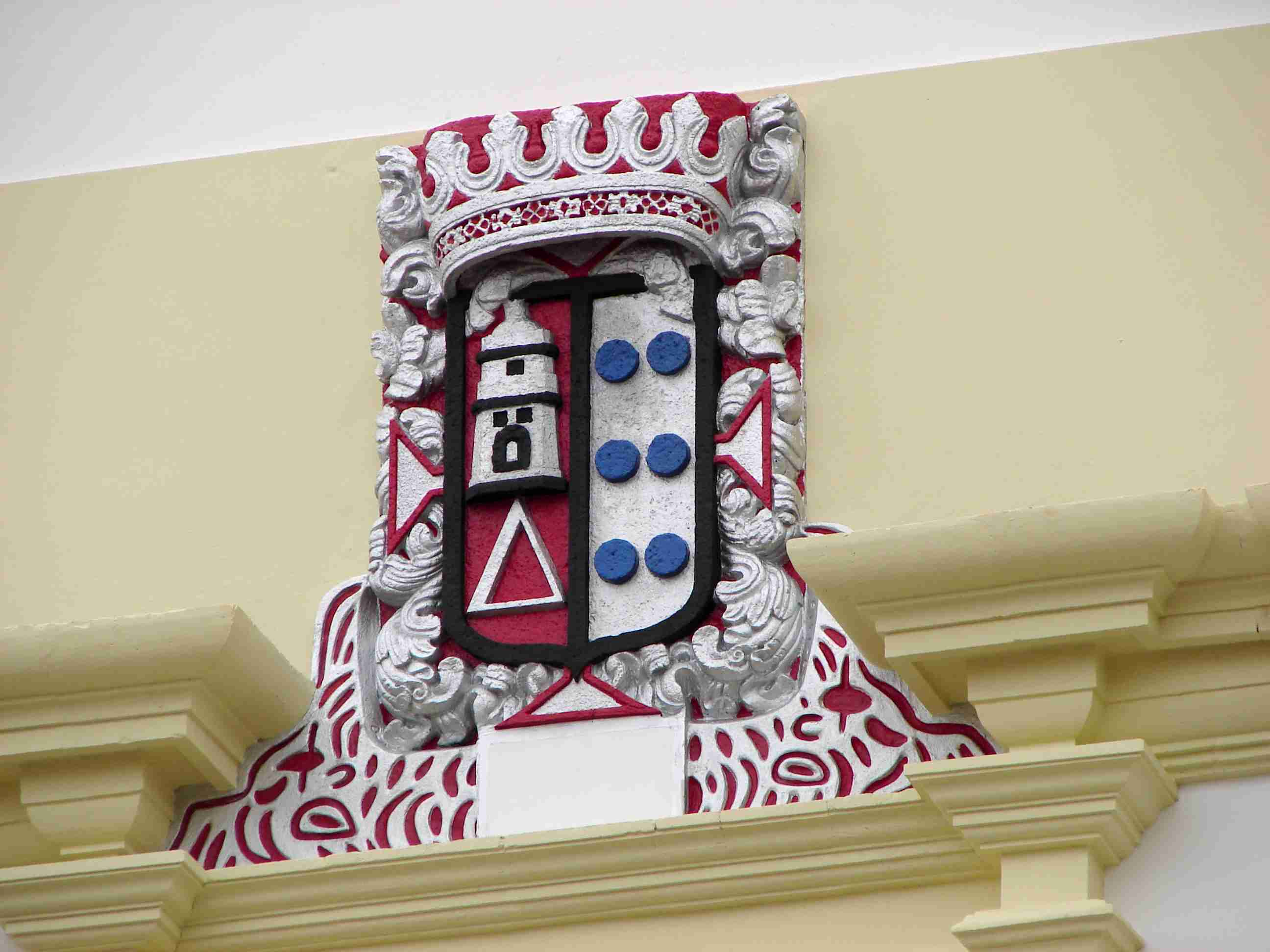 Solar do Provedor das Armadas, Brasão do Solar, ilha Terceira, Açores, Portugal.